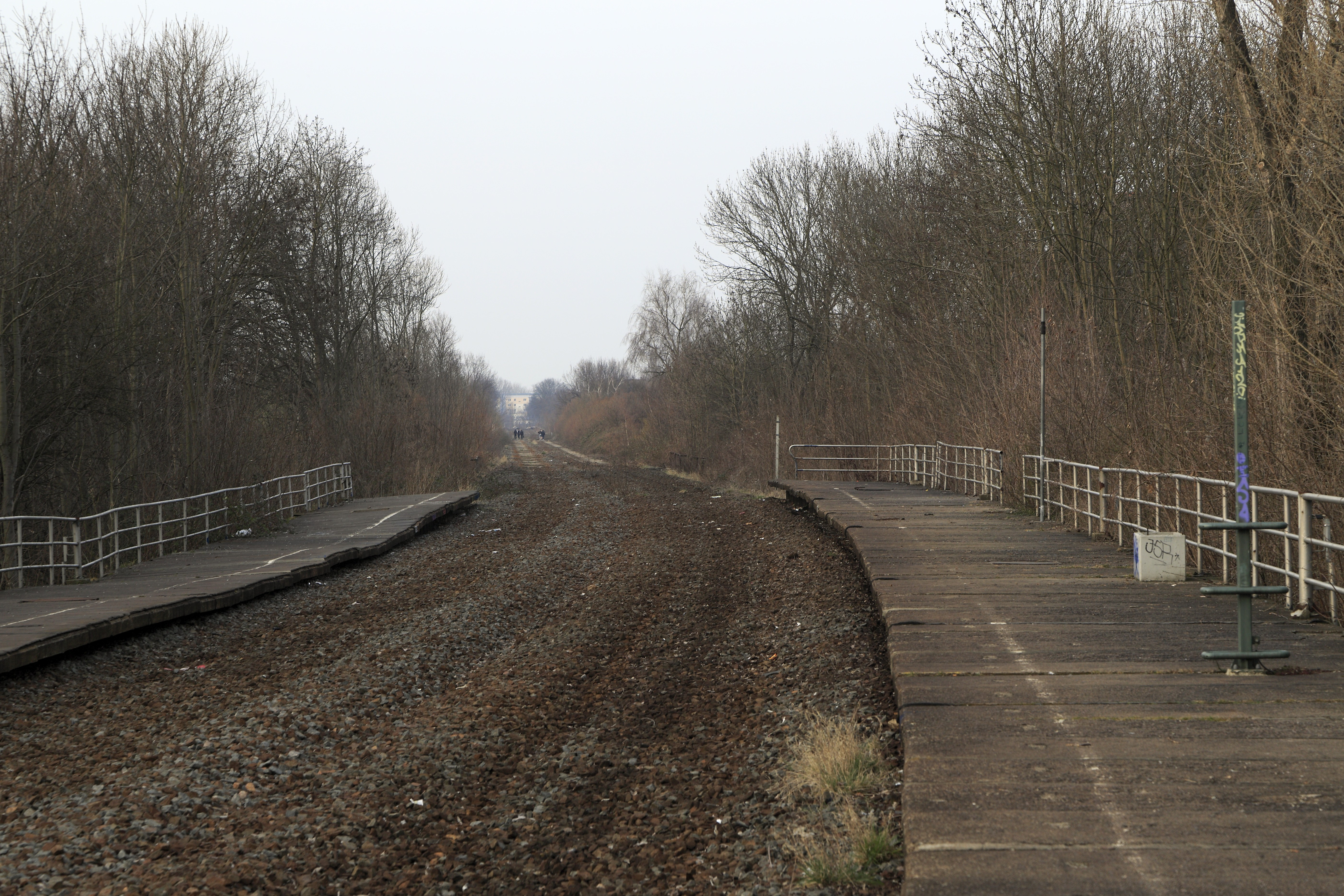 Bahnsteige nach Gleisrückbau, der Bahnsteig links ist auffällig abgerutscht. Der Metallmast rechts trug die einstreifige Vorsignalbake des Blockvorsignals V36